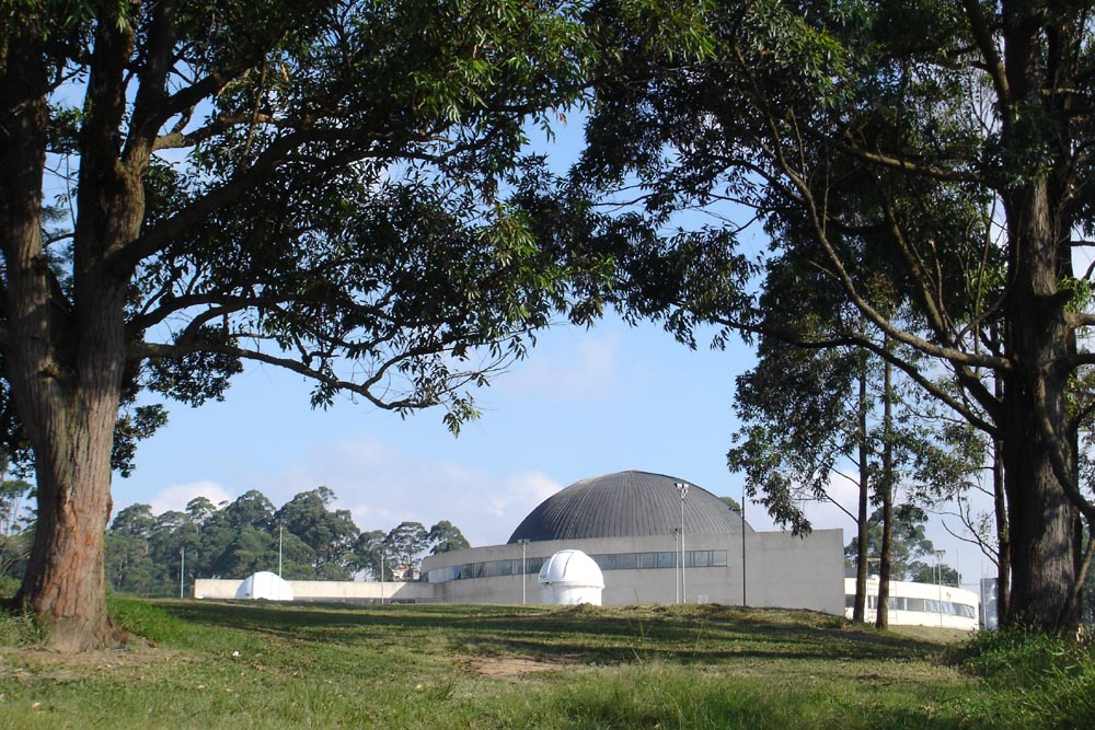 Carmo Planetarium